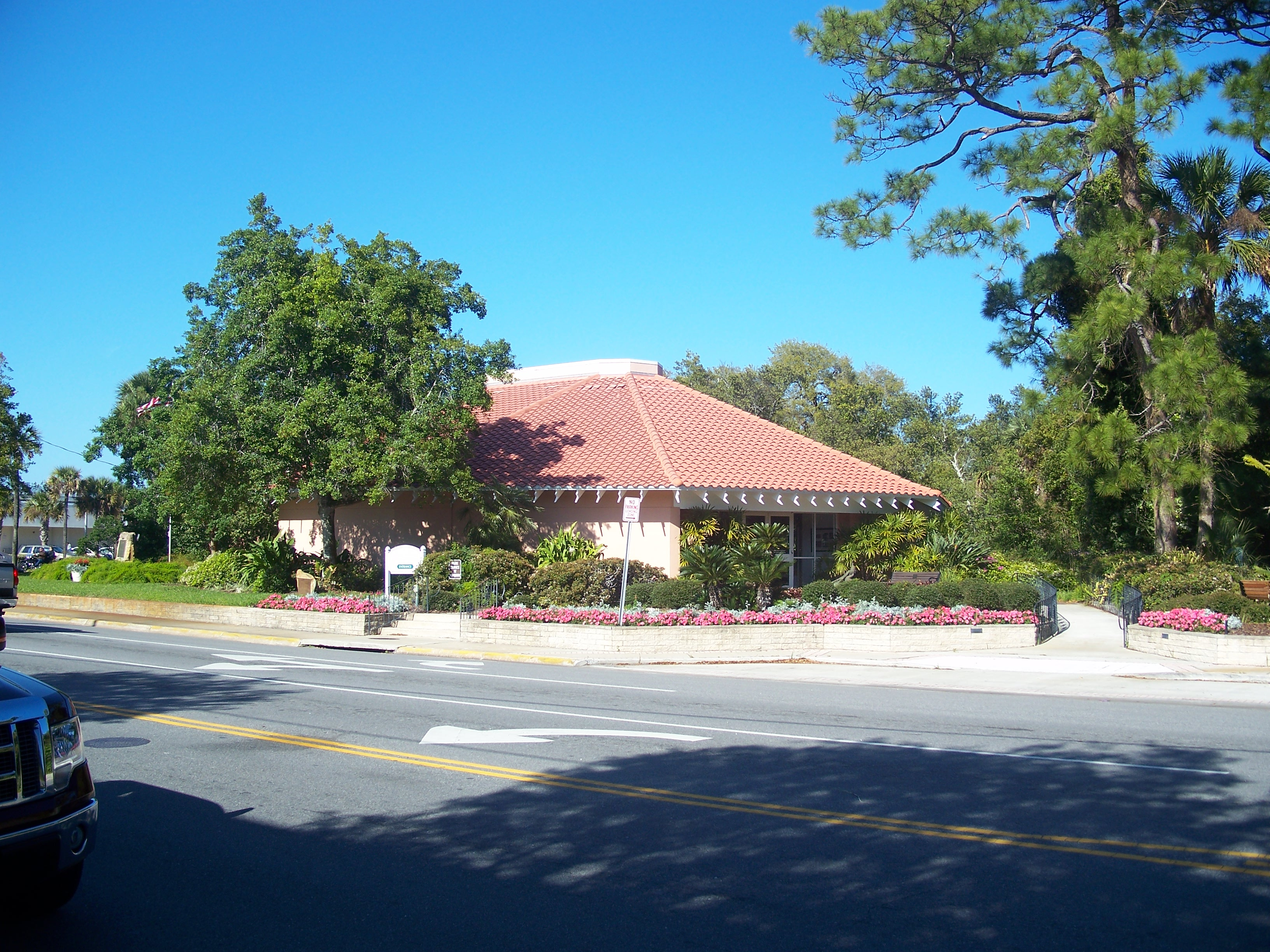 Ormond Beach, Florida: Ormond Memorial Art Museum & Gardens